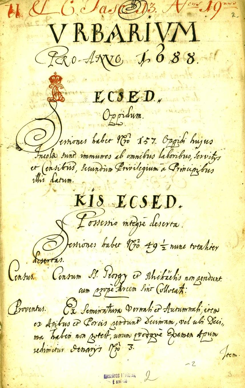 "Conscriptio", melyet a kállói postamester, Tolvay Ferenc és az uradalom provisora, Nagy György készítettek. Rákóczi-árváknak a fiskus részéről visszaadásra kerülő javak. Ecsed uradalma. Birtokos: Rákóczi Ferenc árvái. (Szatmár m.): Ecsed mezőváros – Kis Ecsed deserta – Szent Marton deserta – Matocs – Geberjen – Tunyog deserta – Beőrvej – Vállaj – Mérk – Szoldobál Terem deserta – Szalka – Jármi – Majtén – Dob – Királydarots – Szentmiklós – Gyöngy deserta – Nyiregyháza – Nyiradony – Gilvács deserta – Tagy deserta – Kisfalud – Radvány praedium – Nyirbátor mezőváros – Nyiradony – Gyulai – Pócs – Szaniszló – Misztótfalu mezőváros – Busák – Nagy Sikarló – Kis Sikarló – Apa – Josephhaza – Gorbed – Tőketerebes – Fabianház – Porcsalma – Kalmand – Déda deserta – Felső Ábrány deserta – Alsó Ábrány deserta – Magyar Csaholy deserta – Csany deserta – Usztató deserta – Deser – Kecs – Per – Genete Curia Gyarmathiensis: Fejér Gyarmath – Kis Ar – Tivadar – Tarpa